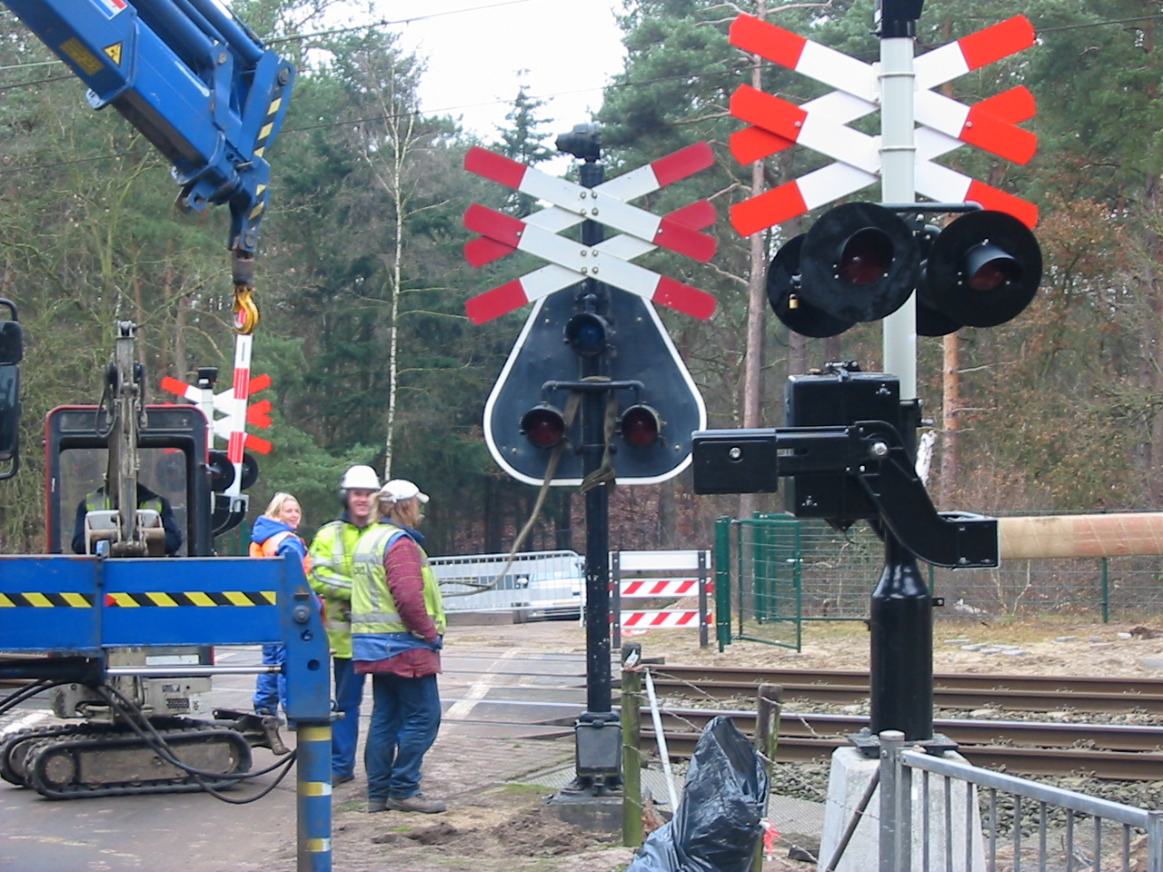 Zelfgemaakte foto.